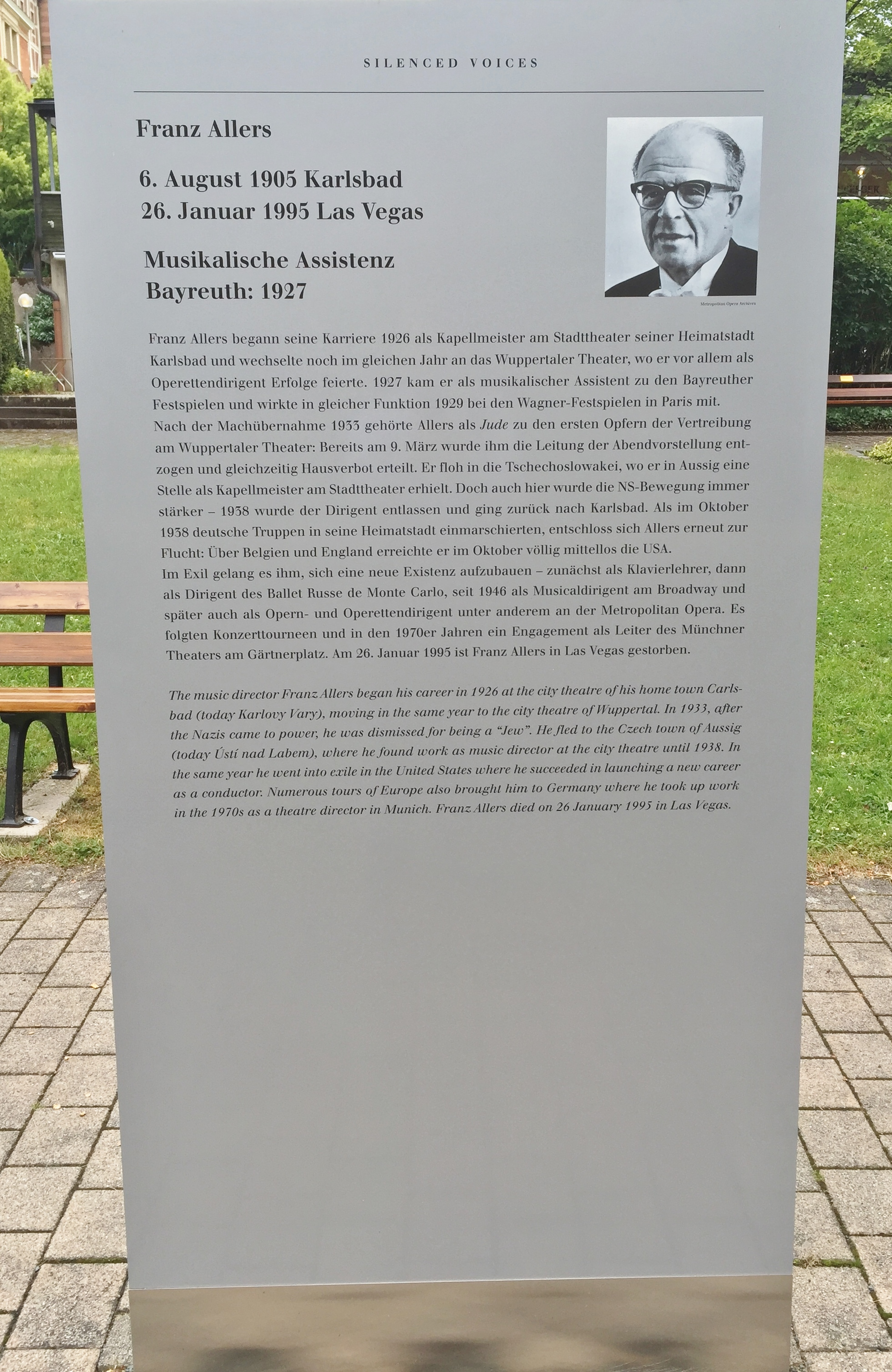 "Verstummte Stimmen - Die Bayreuther Festspiele und die 'Juden' 1876 bis 1945", Ausstellung 2016